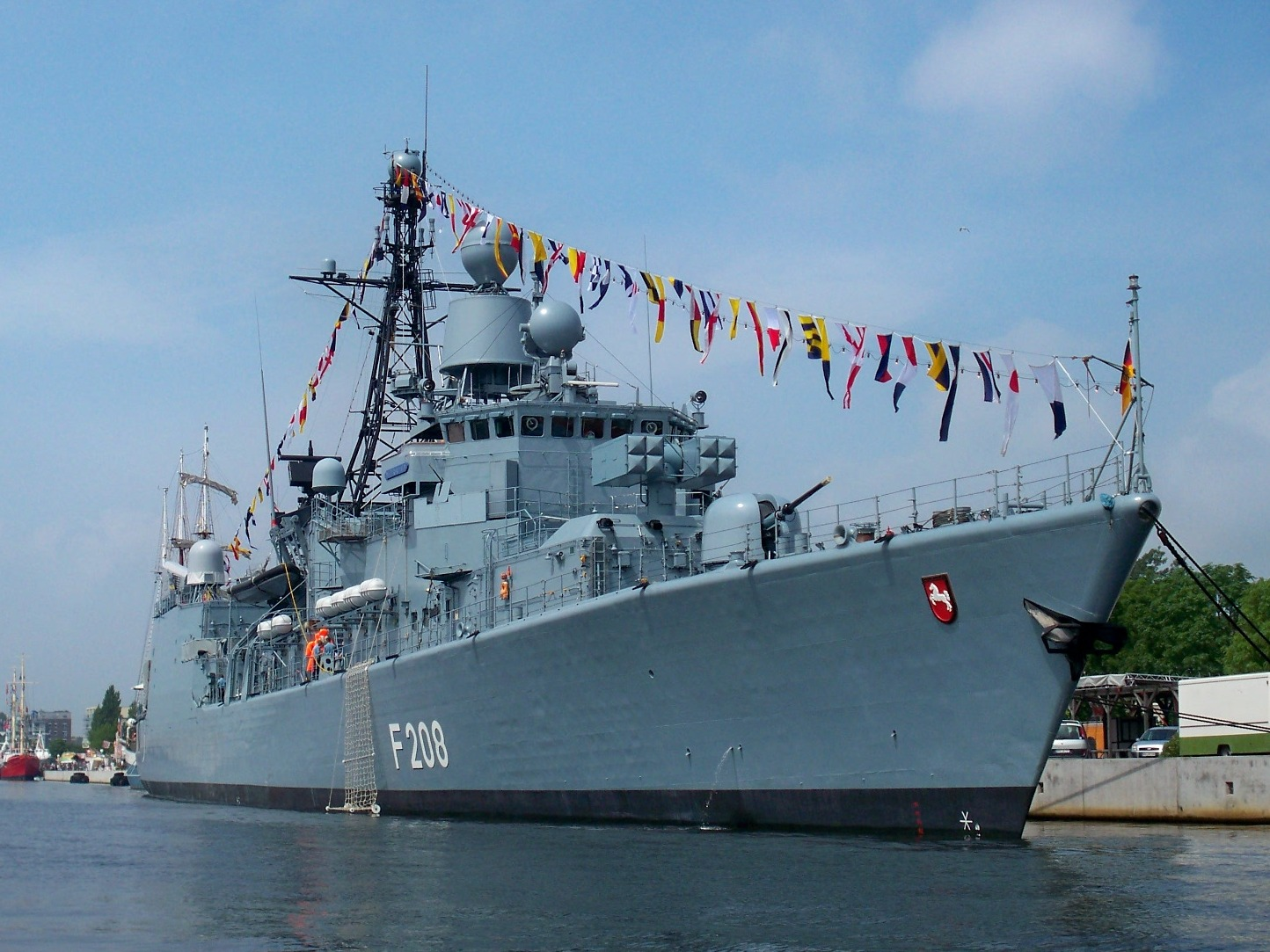 Fregatte Niedersachsen am Bontekai während des 38. Wochenendes an der Jade